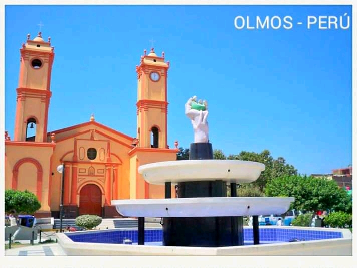 Olmos